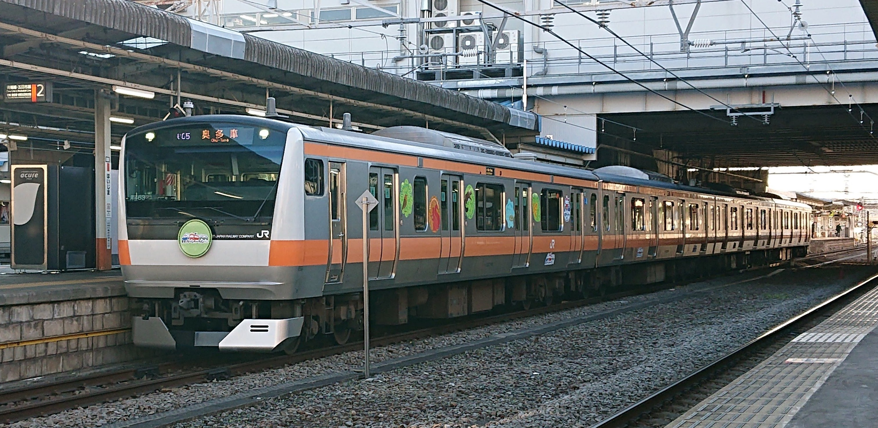 E233 Tokyo Adventure Line Wrapping Train（2019）